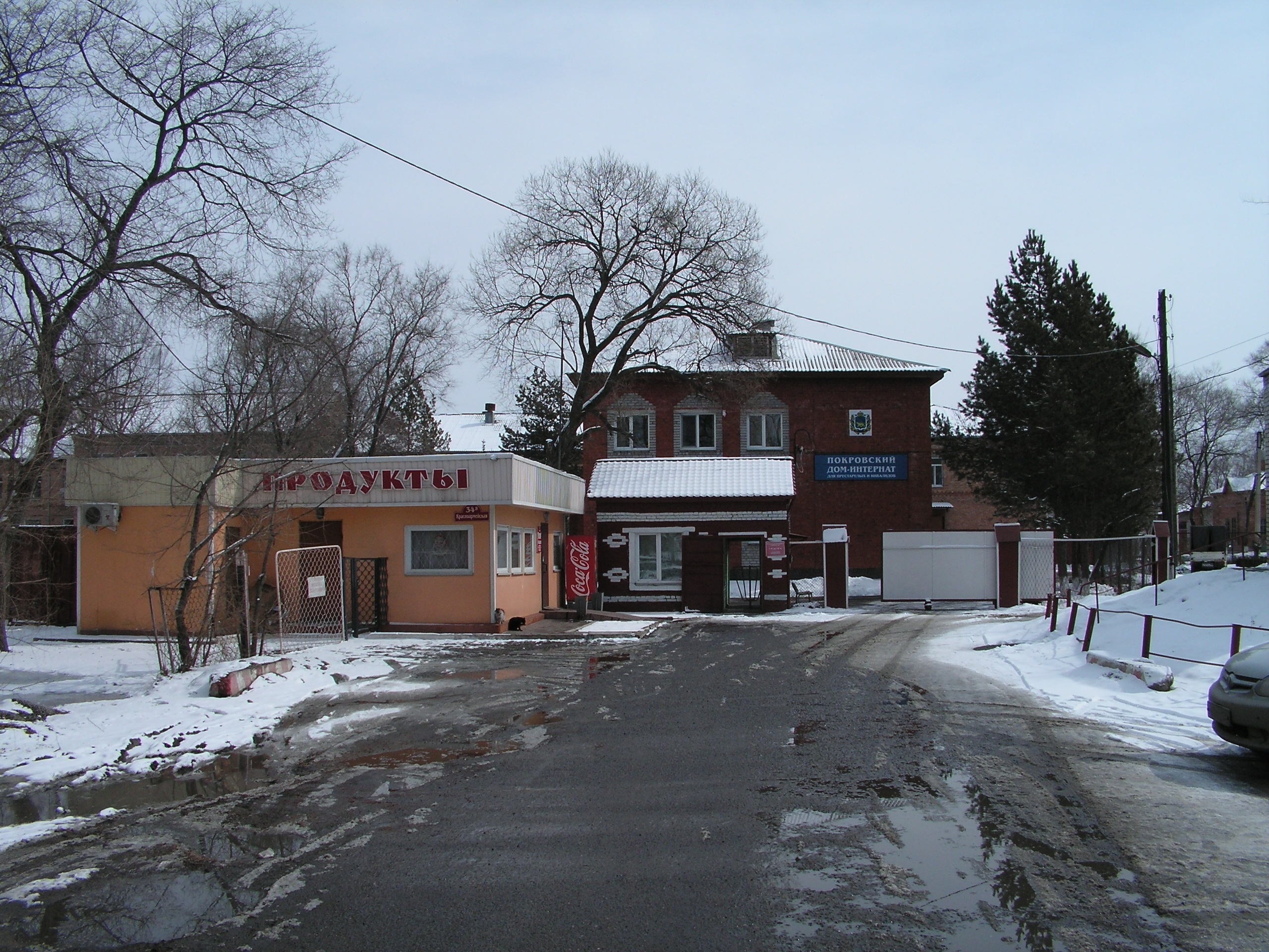 Дом-интернат для престарелых и инвалидов в с. Покровка Приморского края